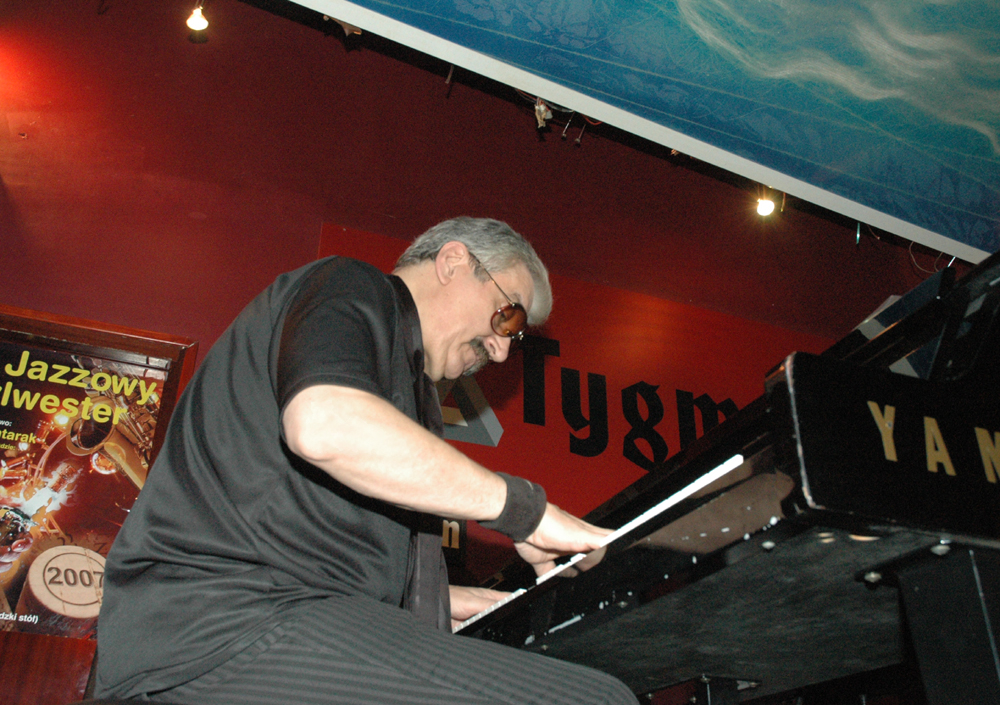 Wojciech Karolak playing the piano at jazz club Tygmont in Warszawa. Photograph by Henryk Kotowski in December 2006.